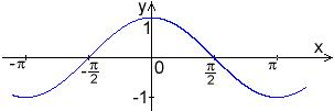 Graf funkce kosinus. mnmnn